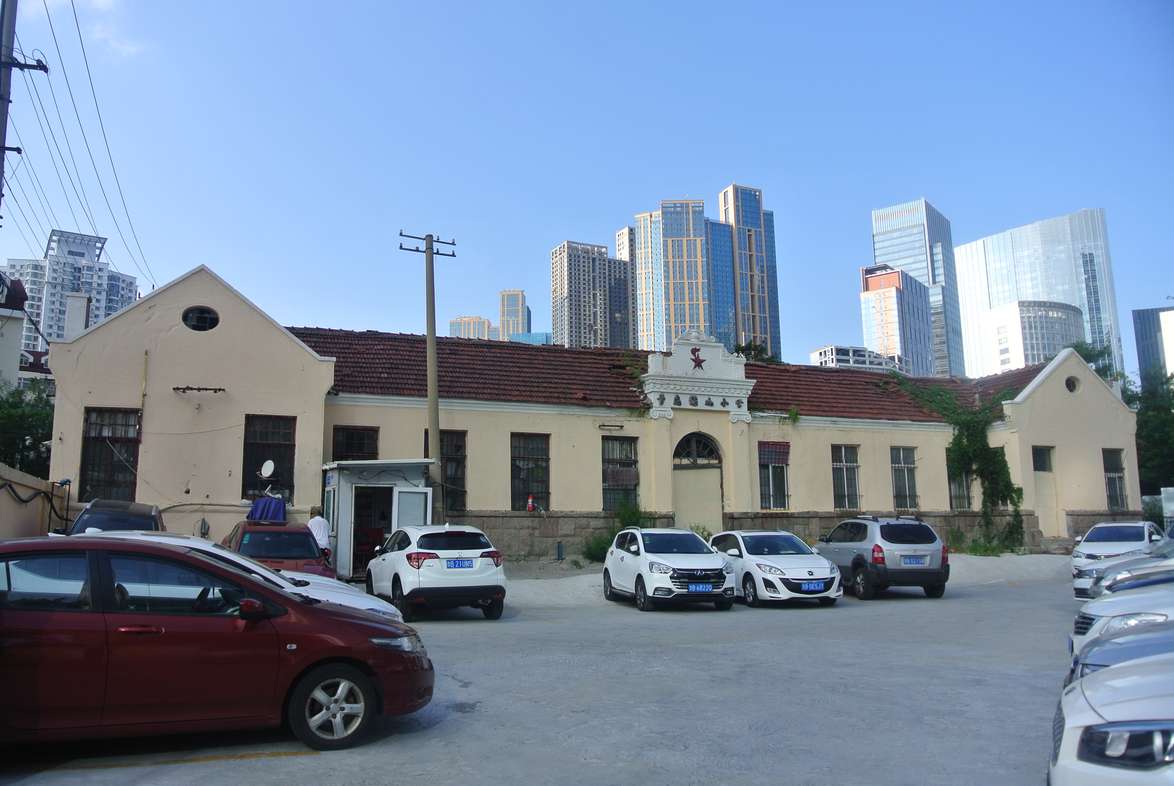 青岛湛山小学